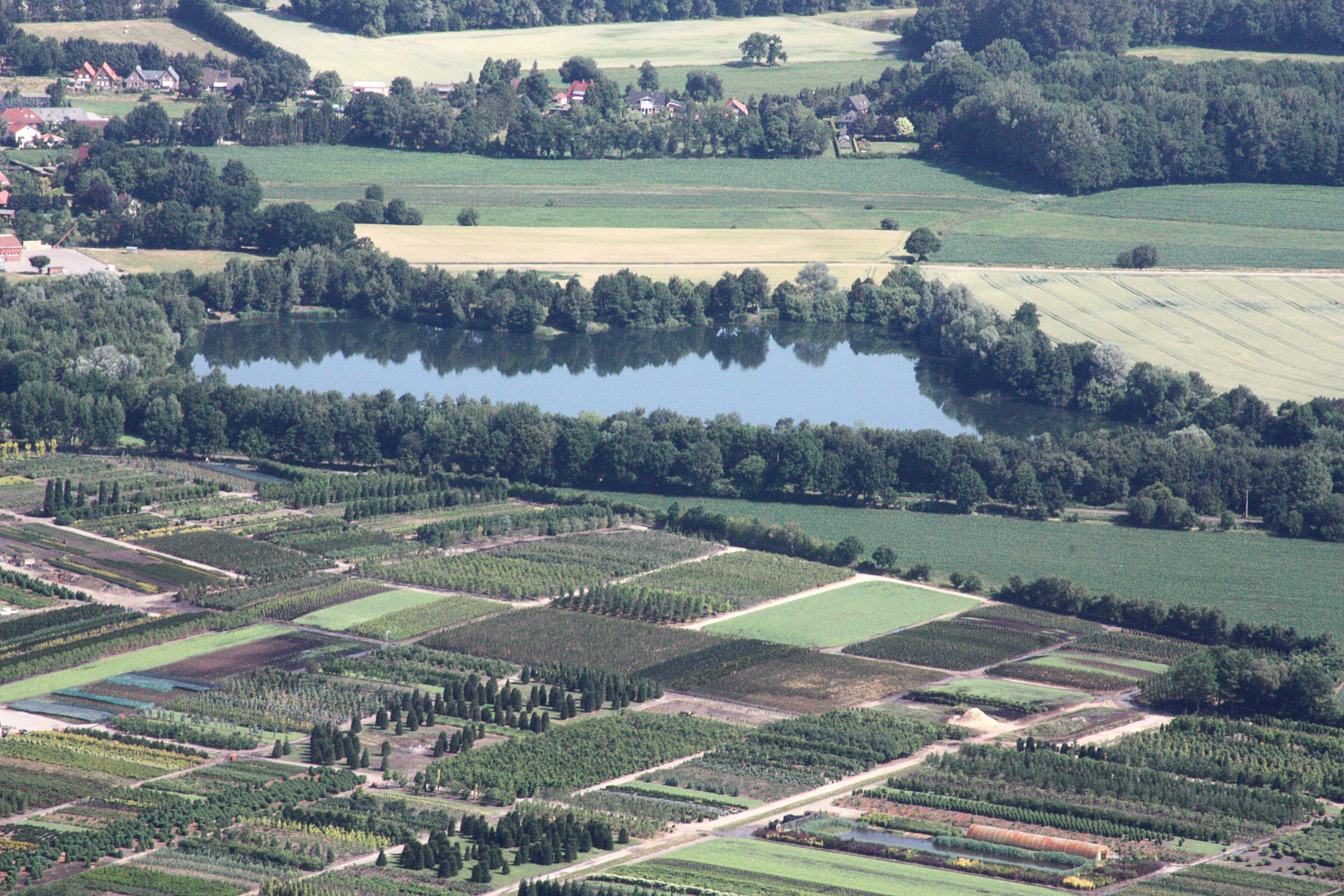 Flug von Oldenburg (Oldenburg) nach Bad Zwischenahn und zur Landesgartenschau ; Flughöhe 1500 ft; Juli 2010; Originalfoto bearbeitet: Tonwertkorrektur und Bild geschärft mit Hochpassfilter